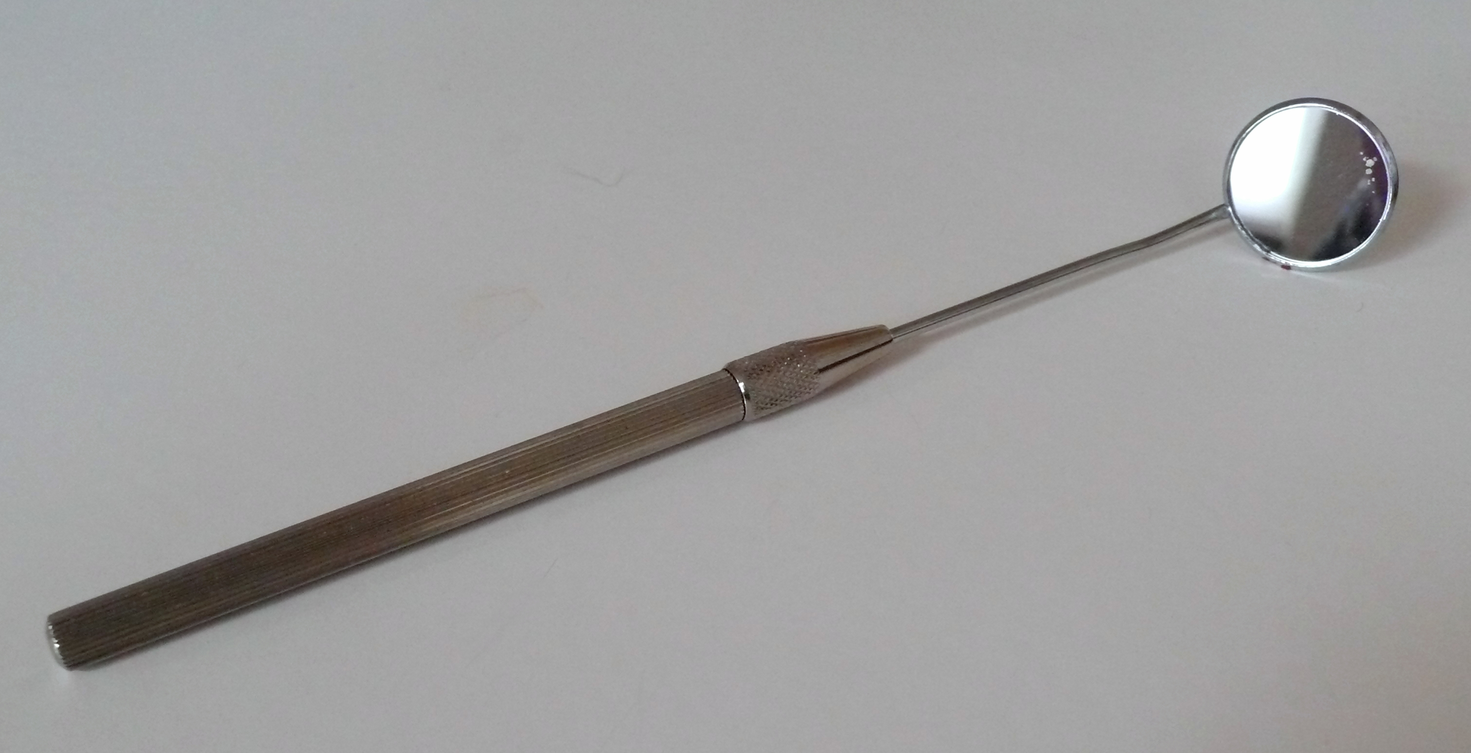 Larynxspiegel der Hals-Nasen-Ohren-Heilkunde